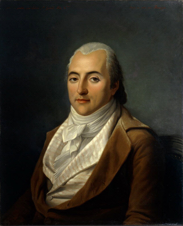 Portrait posthume de Claude-Henri de Rouvroy, comte de Saint-Simon, âgé de 35 ans. Huile sur toile d'Hippolyte Ravergie d'après un dessin d'Adélaïde Labille-Guiard, BnF, Bibliothèque de l'Arsenal, 1848.